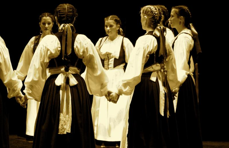 Juan Antonio Urbeltz-ek zuzendutako Argia dantza taldearen "Axuri-Beltza" ikuskizuna. Iruñeko Duguna, Eibarko Kezka eta Elgoibarko Haritz dantza taldeekin. 2011/11/05. Gaiarre antzokia, Iruñea.